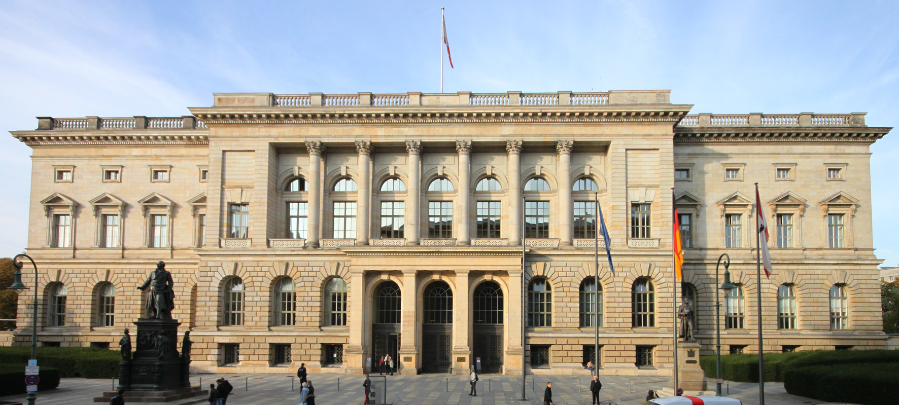 Abgeordnetenhaus von Berlin - Hausansicht des Berliner Landesparlaments in der Niederkirchnerstraße, Berlin Mitte. Seit 1993 tagt das Berliner Abgeordntenehaus im Gebäude des ehemaligen Preußischen Landtags. Das Haus wurde 1899 entworfen und gebaut im Stil der italienischen Hochrenaissance vom Geheimen Baurat Friedrich Schulze.